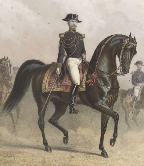 Le colonel Alexis L'Hotte d'après une gravure de Adam Albert et Drake Tom.